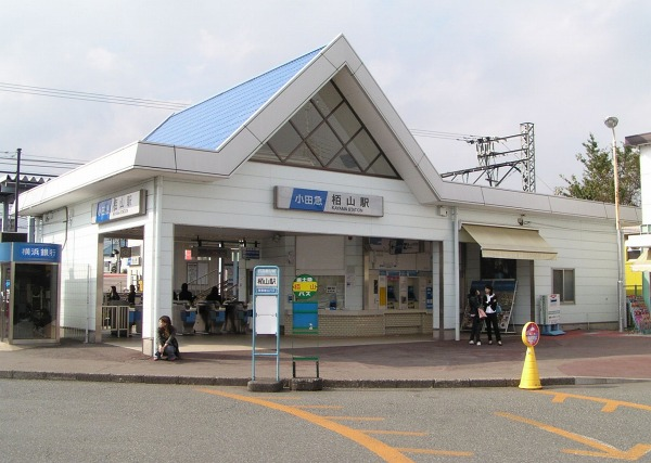 Kayama Station, on the Odakyu Odawara Line, Odawara, Kanagawa 栢山駅